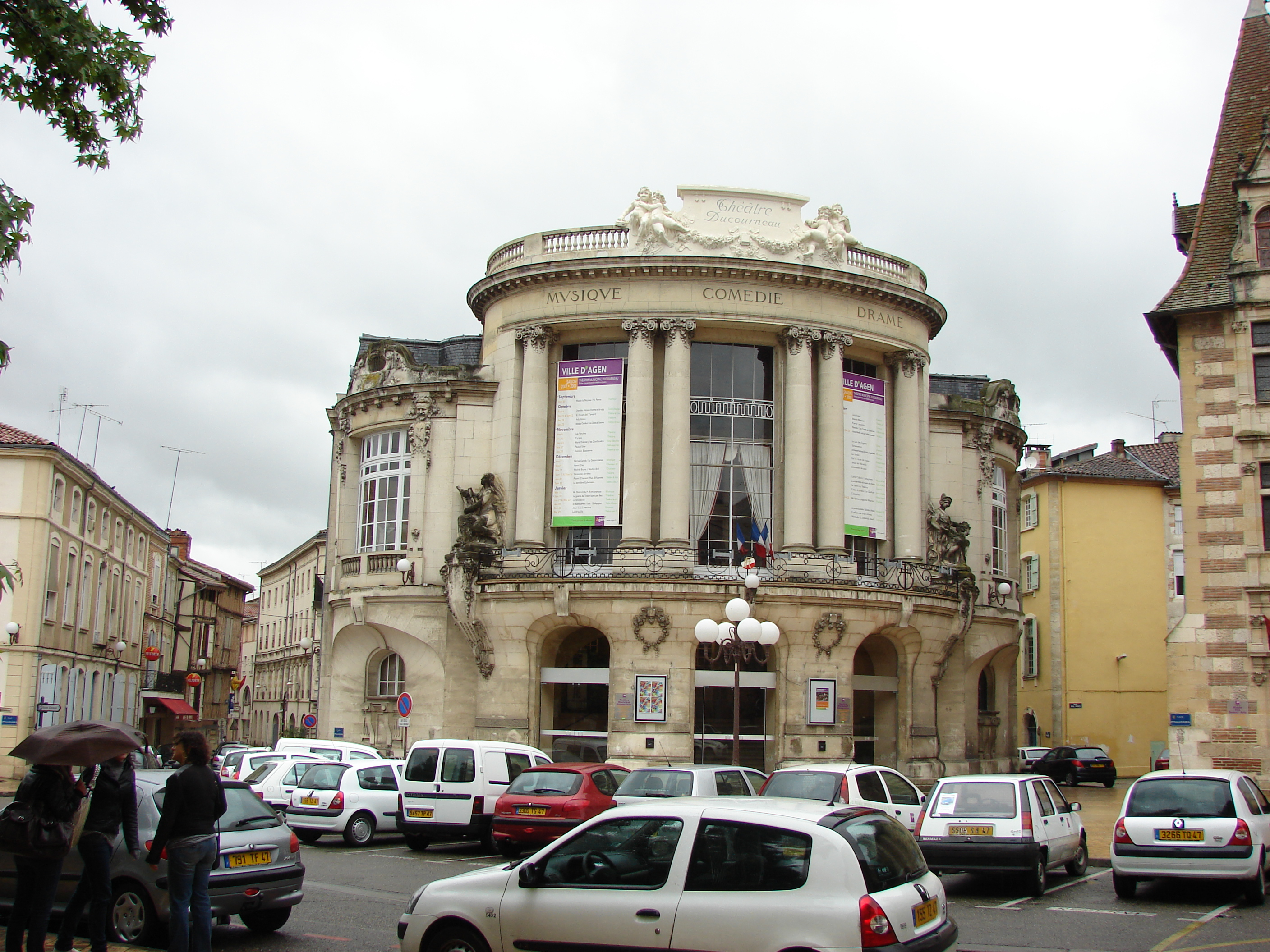 Théâtre, Agen, Aquitaine, France